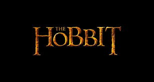 Cartel de El Hobbit, trilogía